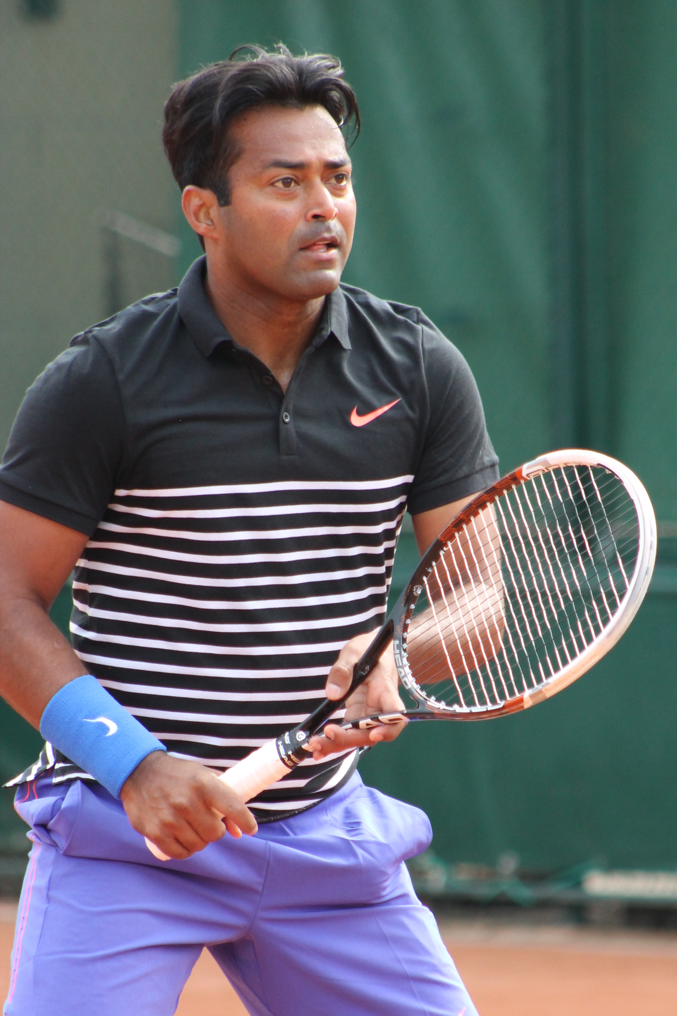 Paes RG15 (4)